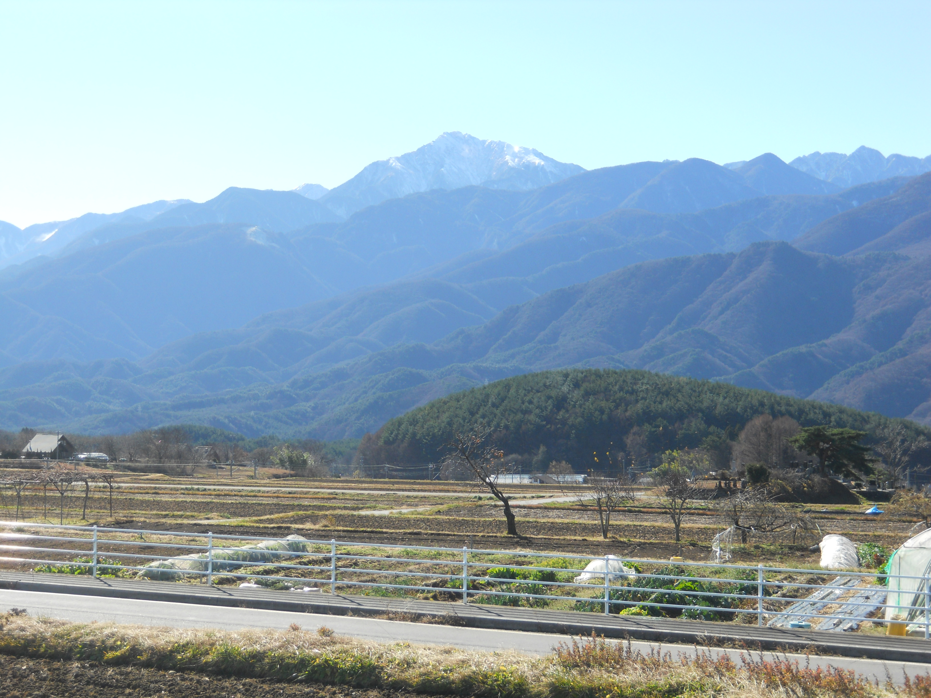 甲斐駒ケ岳